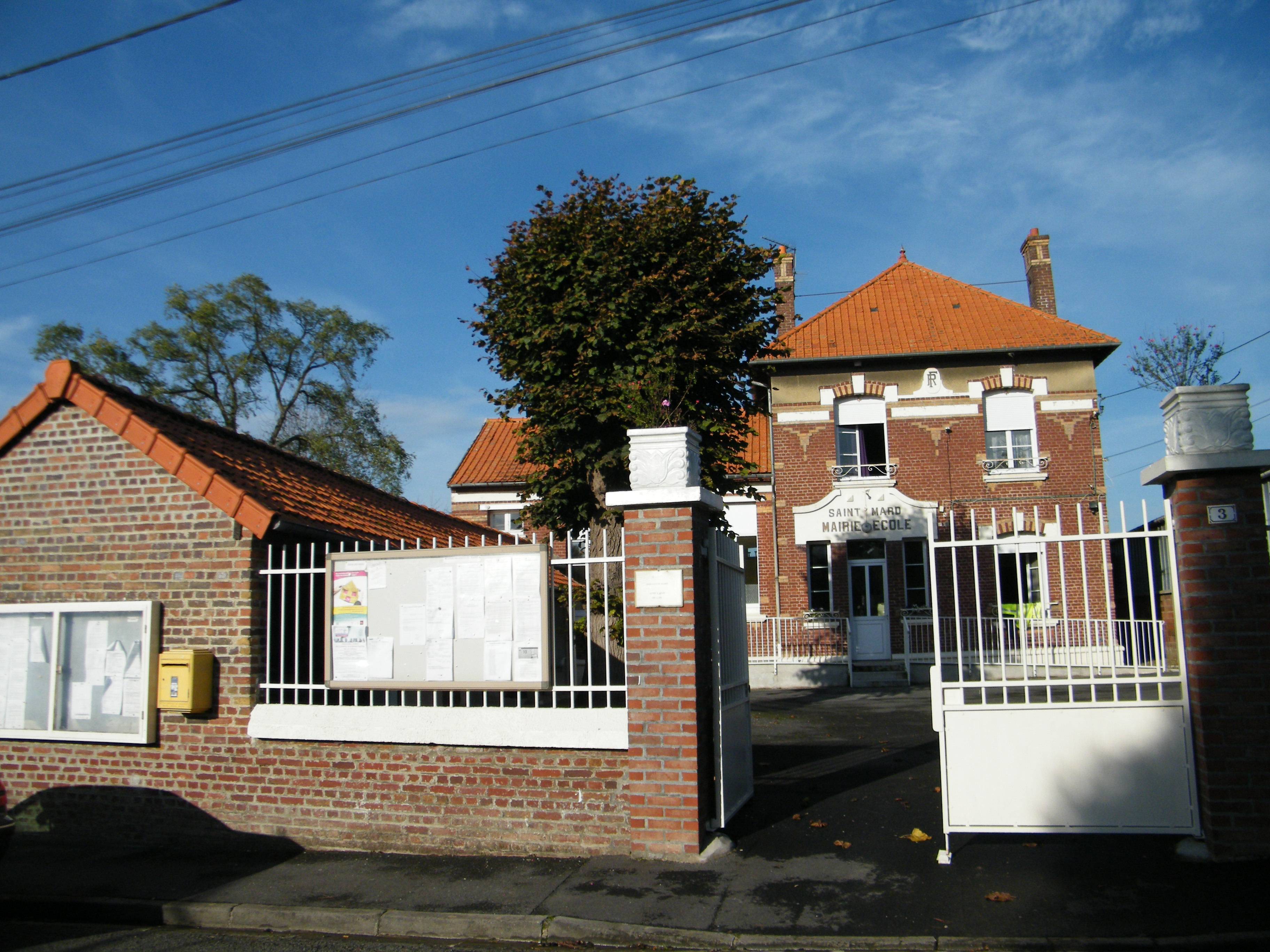 Mairie-école.